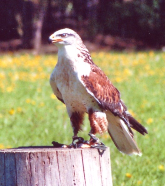 Königsbussard (Buteo regalis) im Wildpark Poing